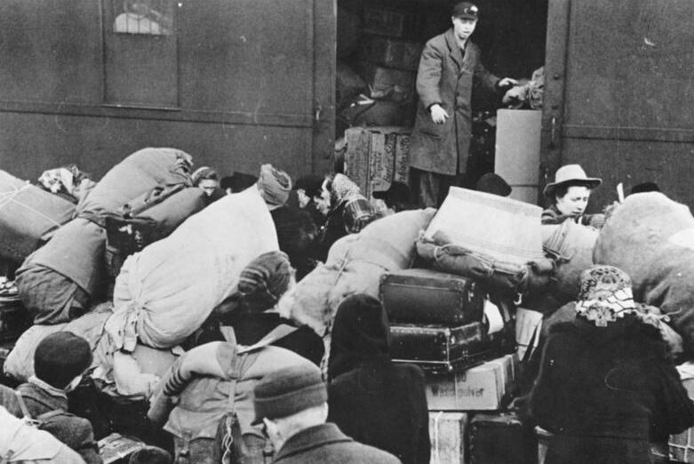 Berlin, Flüchtlinge aus dem Osten ADN-ZB/Archiv II.Weltkrieg 1939-45 Flüchtlingstransport aus den umkämpften Gebieten im Osten Deutschlands treffen im Februar 1945 in Berlin ein. Das Gepäck der Flüchtlinge wird aus dem Zug geladen.